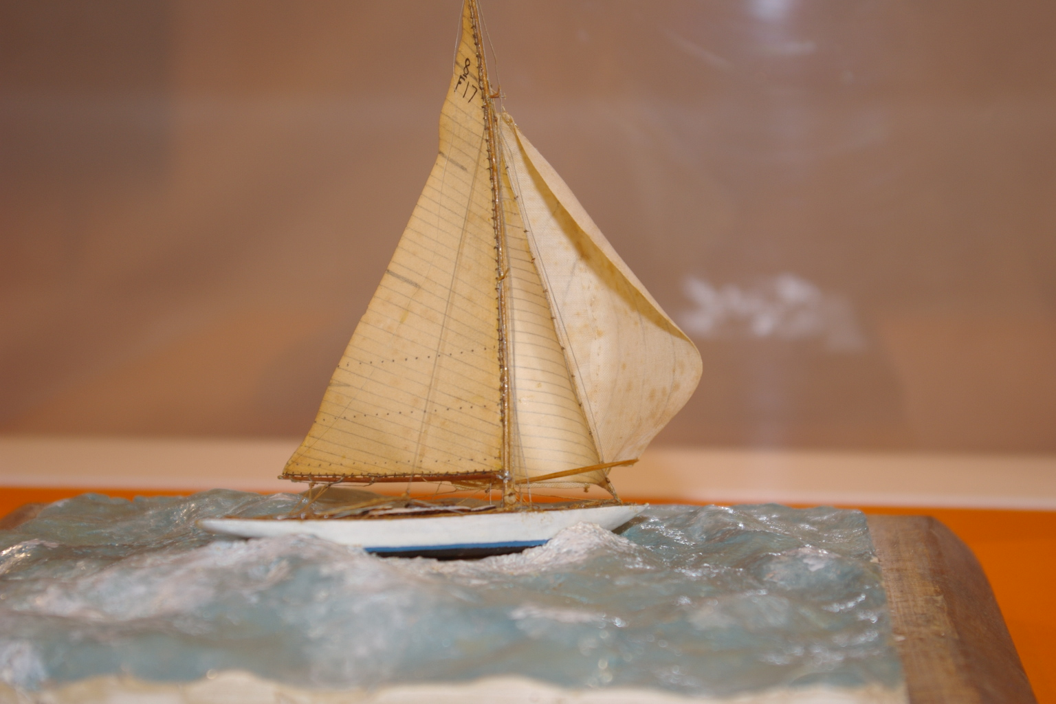 maquette d'un bateau réalisé par Eric Tabarly, exposition au salon nautique de Paris 2010